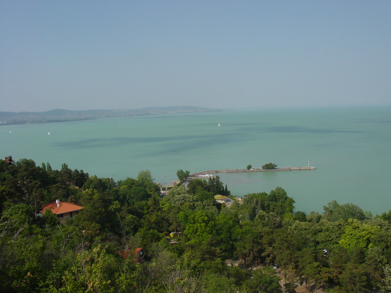 Balaton, Stako, July 2003